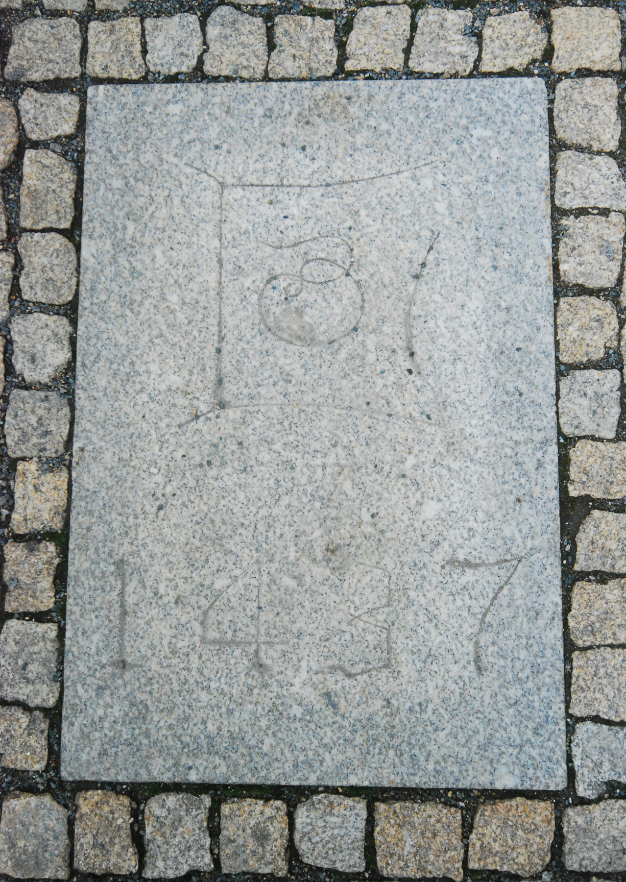 Diese Steinplatte im Gehsteig vor dem Haus Nummer 4 auf dem Masaryk náměstí in Znojmo markiert jene Stelle, an der Kaiser Sigismund angeblich 1437 infolge eines Schlaganfalls vom Pferd stürzte und verstarb.